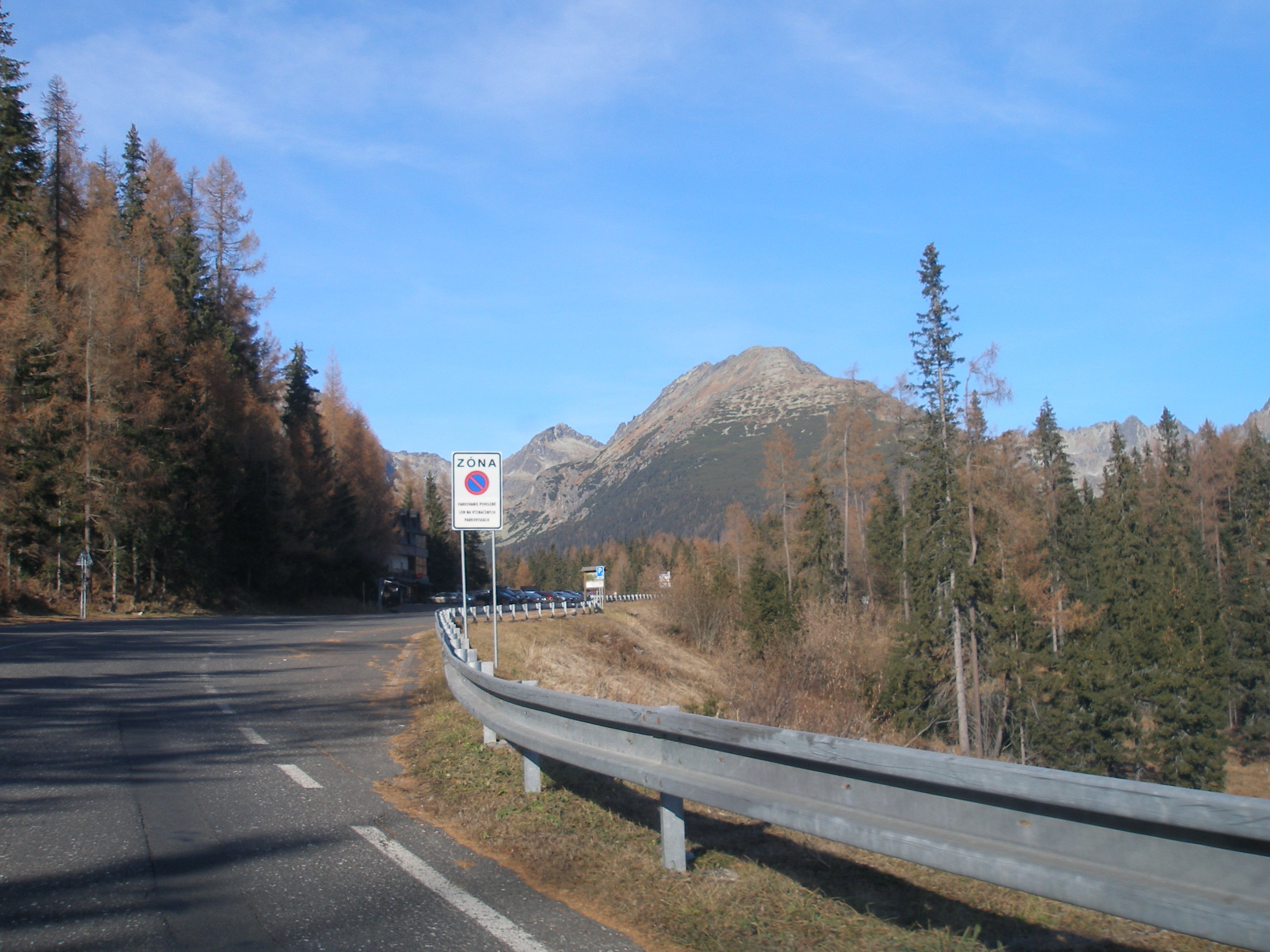 Tatranská osada Štrbské Pleso, katastrálna časť obce Štrba okres Poprad.